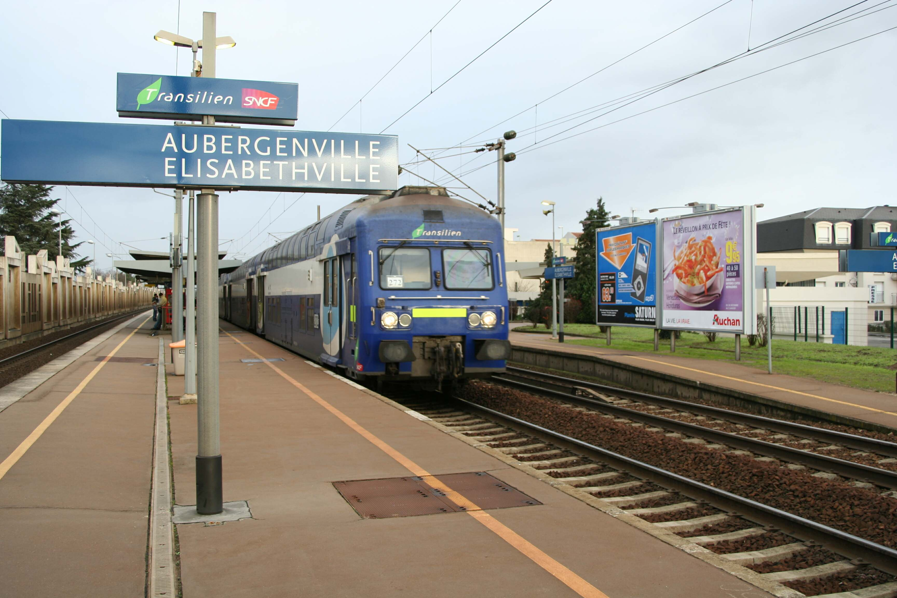 Gare d'Aubergenville - Yvelines (France) Vue des quais.